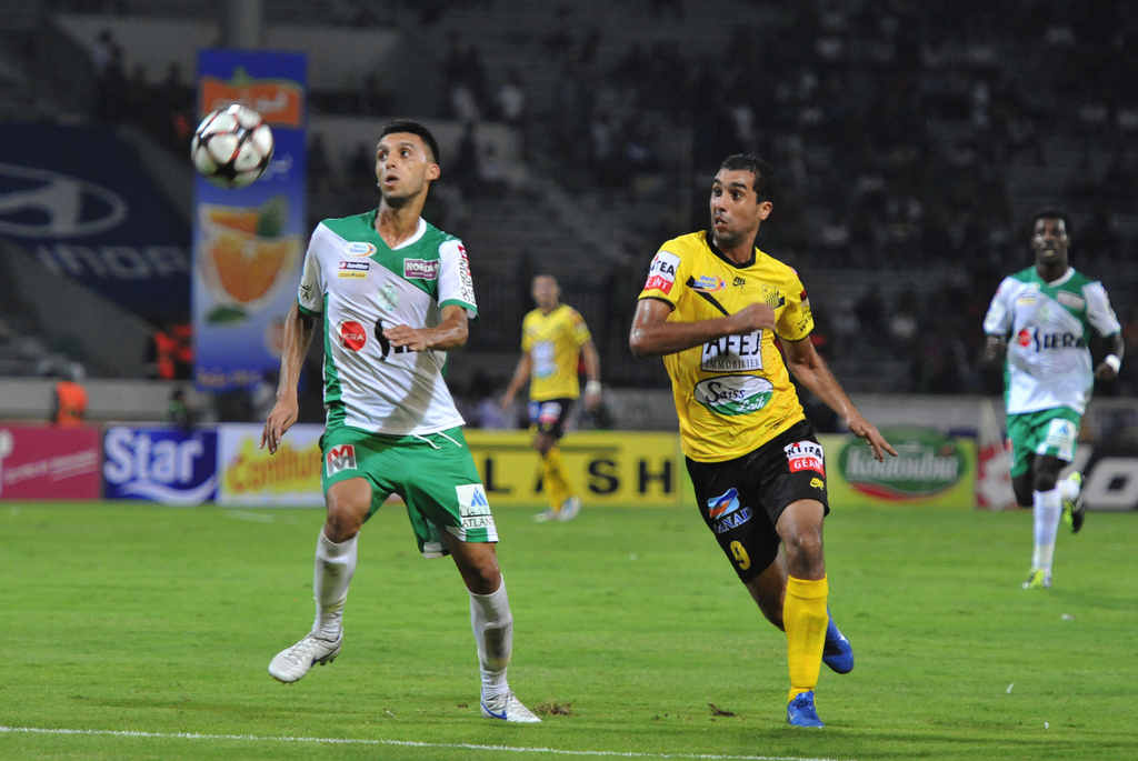 RCA vs MAS